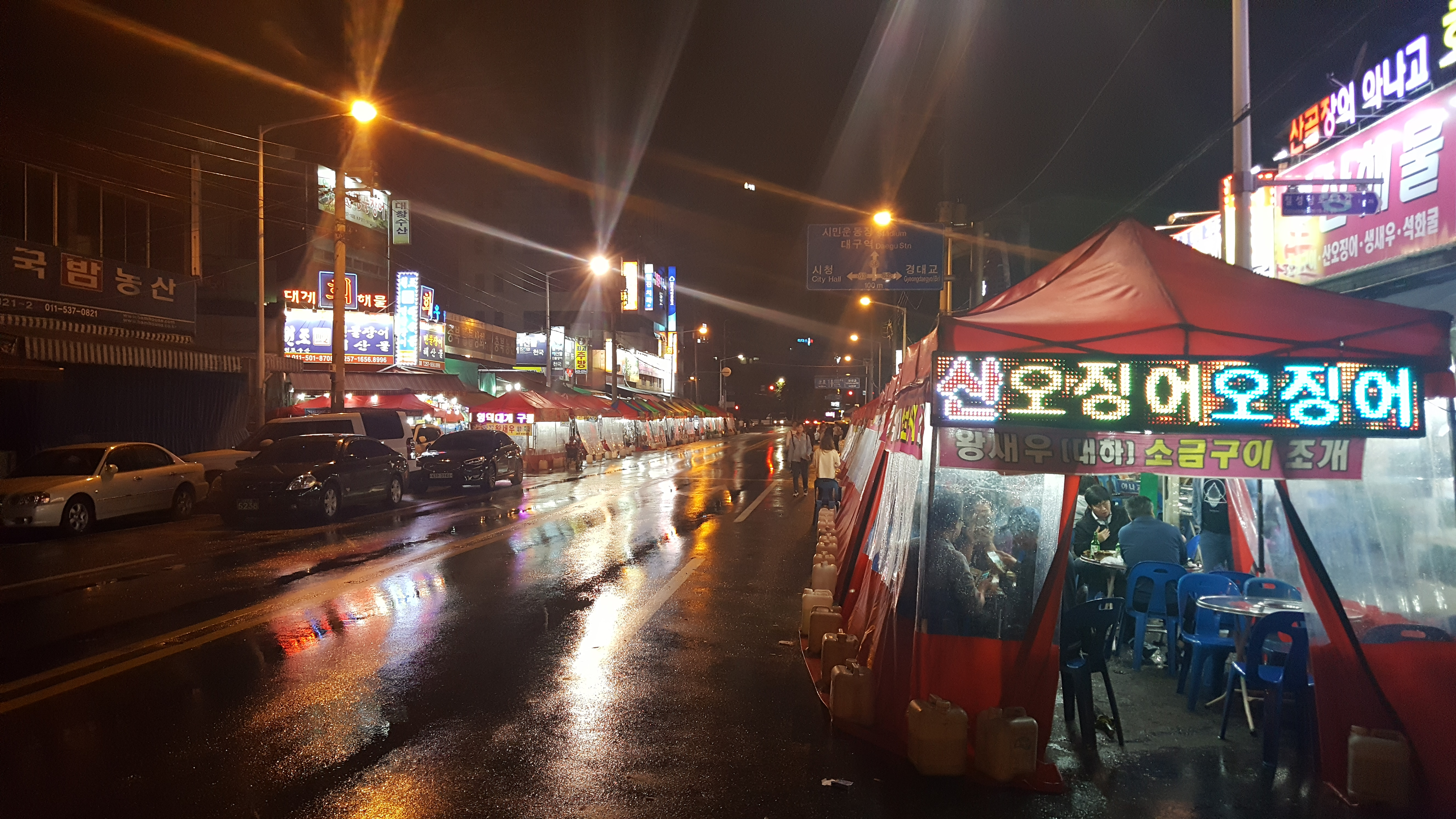 2016년 10월 칠성시장 포장마차 거리